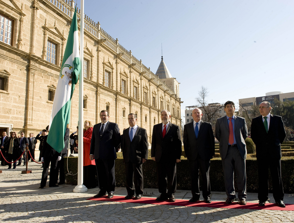 Acto en el Parlamento 2012